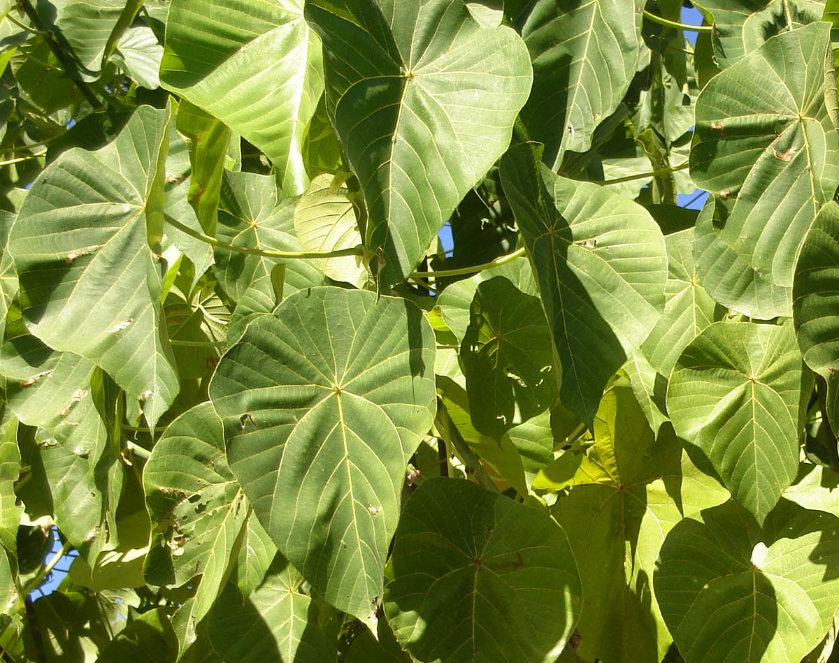 Macaranga harveyana; giantleaf plant (loupata) in Tonga